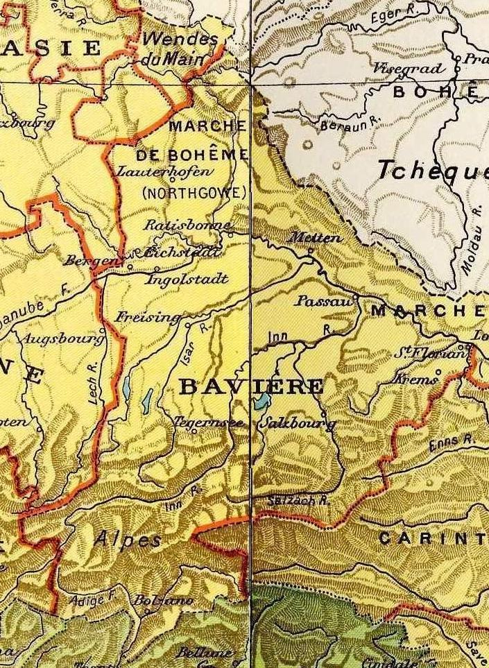 uitsnede uit: Partage de l'Empire carolingien au Traité de Verdun en 843.JPG